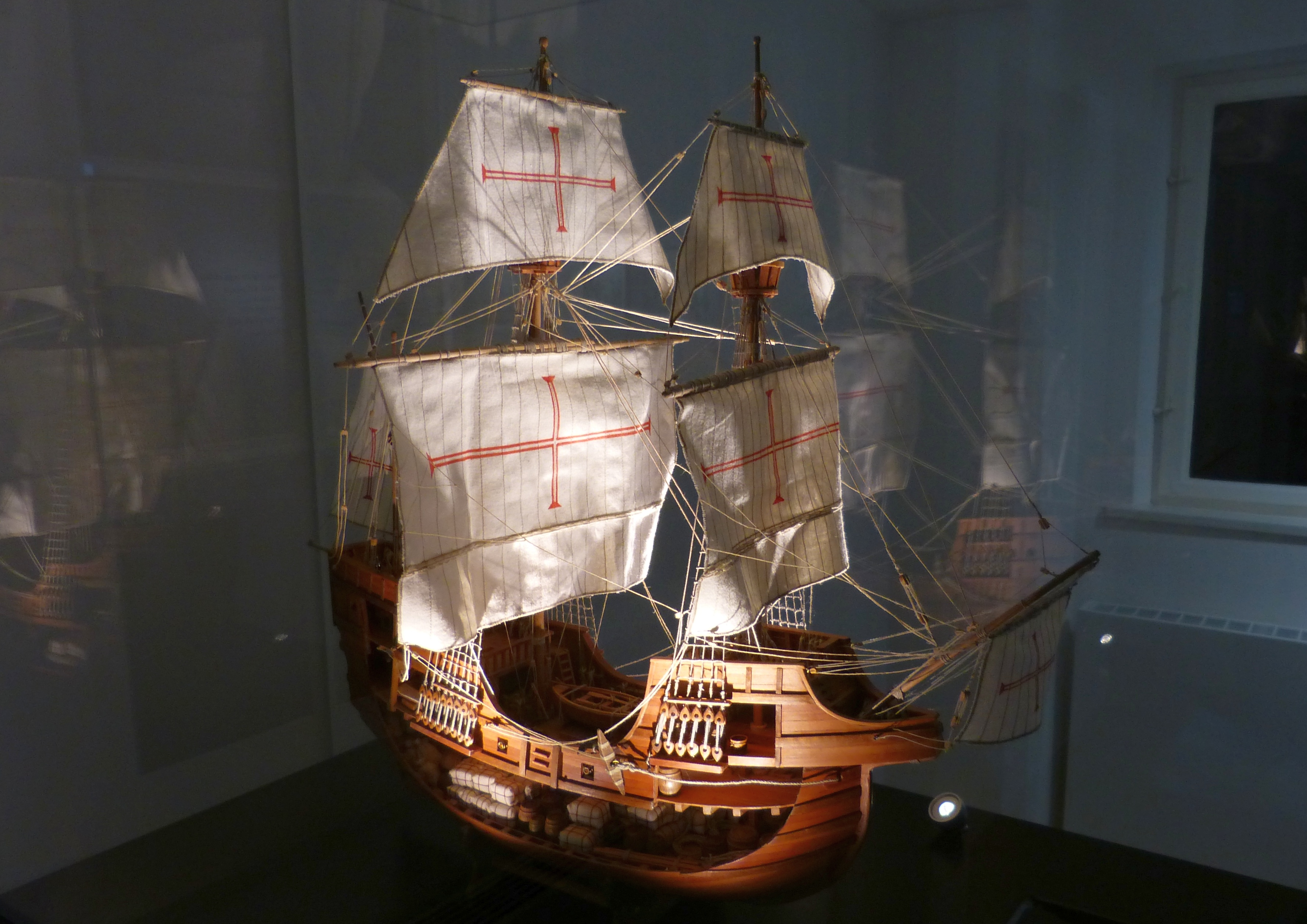 Modell der Nao Lionarda, eines von drei Handelsschiffen eines deutsch-italienischen Konsortiums, das 1505/1506 nach Indien segelte, um von dort Gewürze, v.a. Pfeffer, nach Europa zu bringen. Modell von Hartmut Walter, im Fugger-und-Welser-Erlebnismuseum Augsbug.